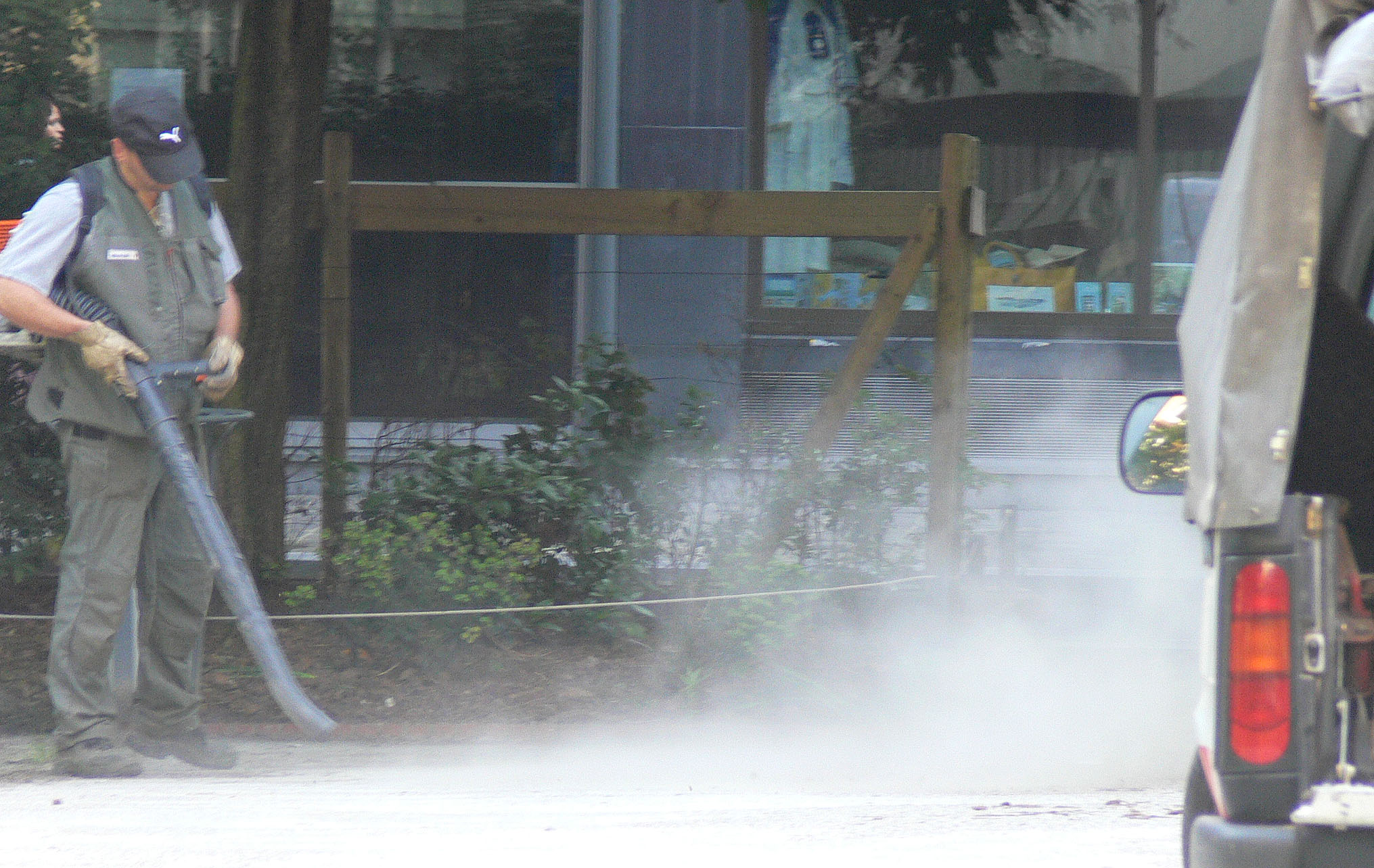 Poussière (incluant résidus de fientes d'oiseaux, crottes de chiens..) dispersée jusqu'à plus de 15 m de hauteur et 100 m de distance suite à l'utilisation d'une Souffleuse, ici dans un square, au centre d'une grande ville française (Lille, où, depuis les souffleuses ne sont plus utilisées que par temps humide). L'engin est sources d'autres nuisances : bruit et émissions de fumées grasses. Selon les pays il est recommandé ou obligatoire de porter un masque FFP2 ou FFP3 pour se protéger les poumons dans un milieu de travail riche en poussière. Il aurait été possible d'aspirer la poussière ou de la balayer avec de la sciure mouillée ou après une brumisation d'eau.